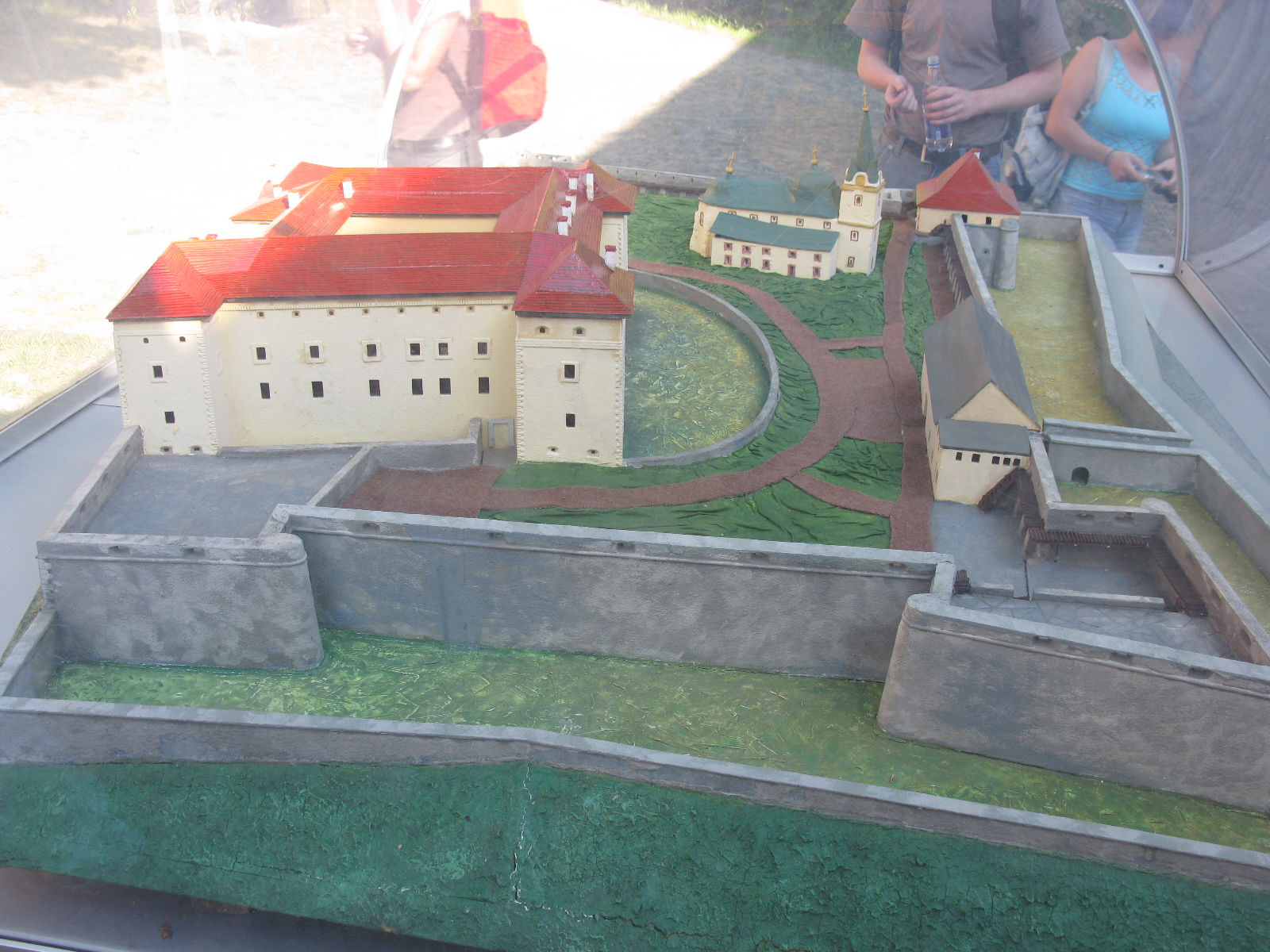 Ужгород. Макет замку.